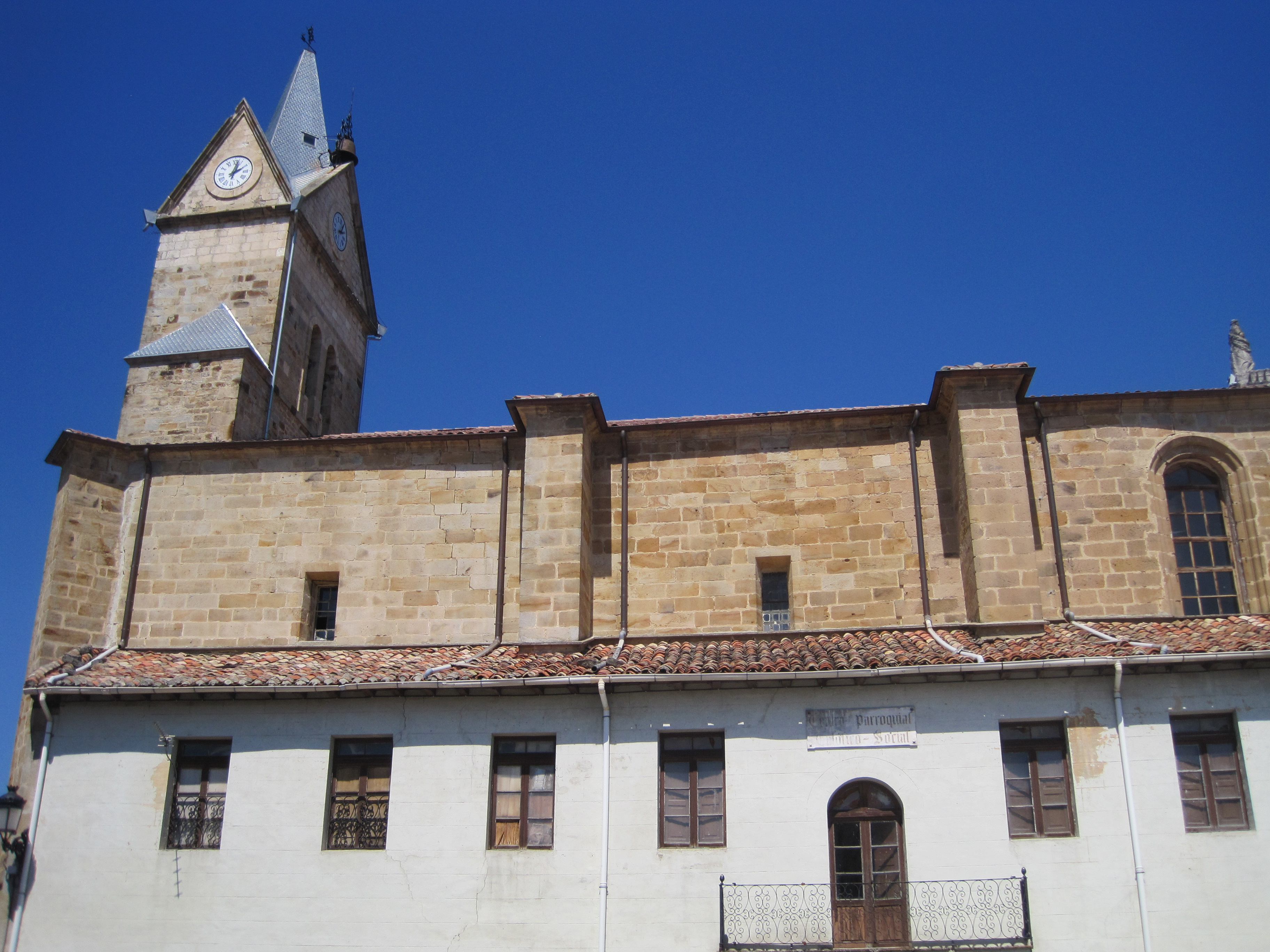 Vista del lateral con acceso a la iglesia de Santa Cecilia de Espinosa.